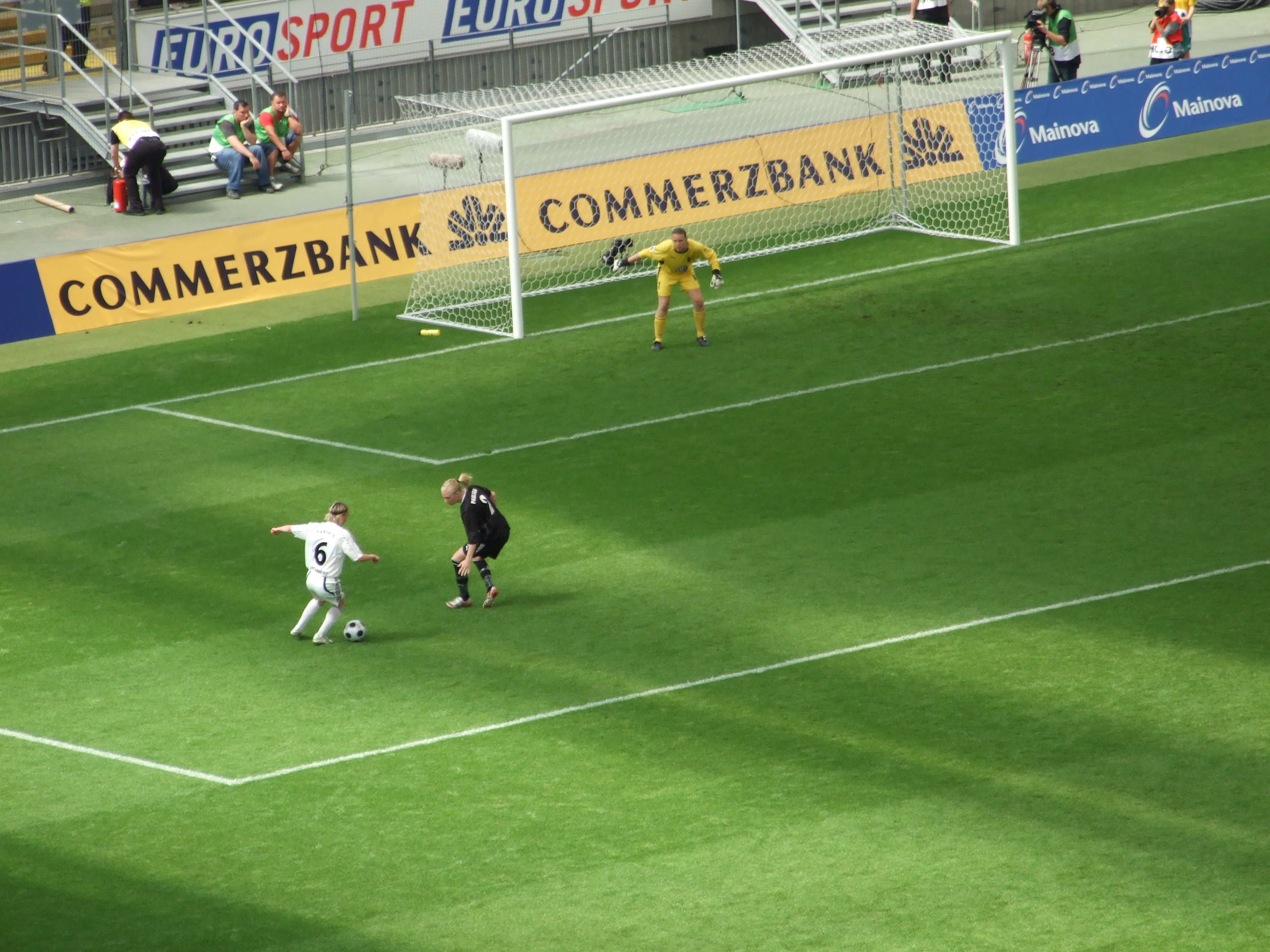 2. Halbzeit, Dreikampf von Conny Pohlers (1. FFC) gegen Anna Paulson und Ulla-Karin Rönnlund (Umeå), Commerzbank-Arena bei dem UEFA-Women's-Cup 2007/2008, Finalrückspiel zwischen 1. FFC Frankfurt und Umeå IK damfotboll